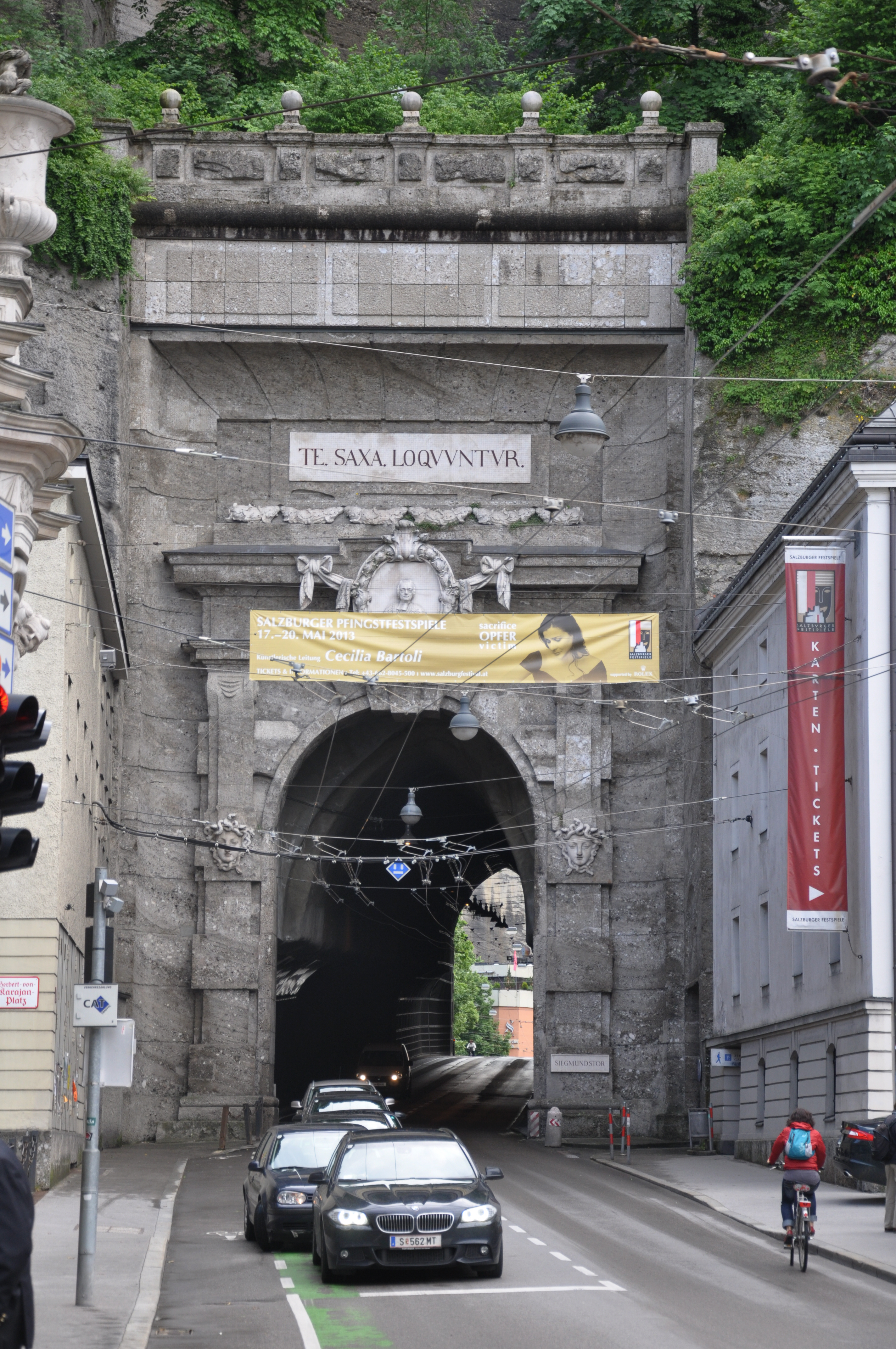 Salzburg, Sigmundstor (Neutor), Ostportal (Stadtseite)